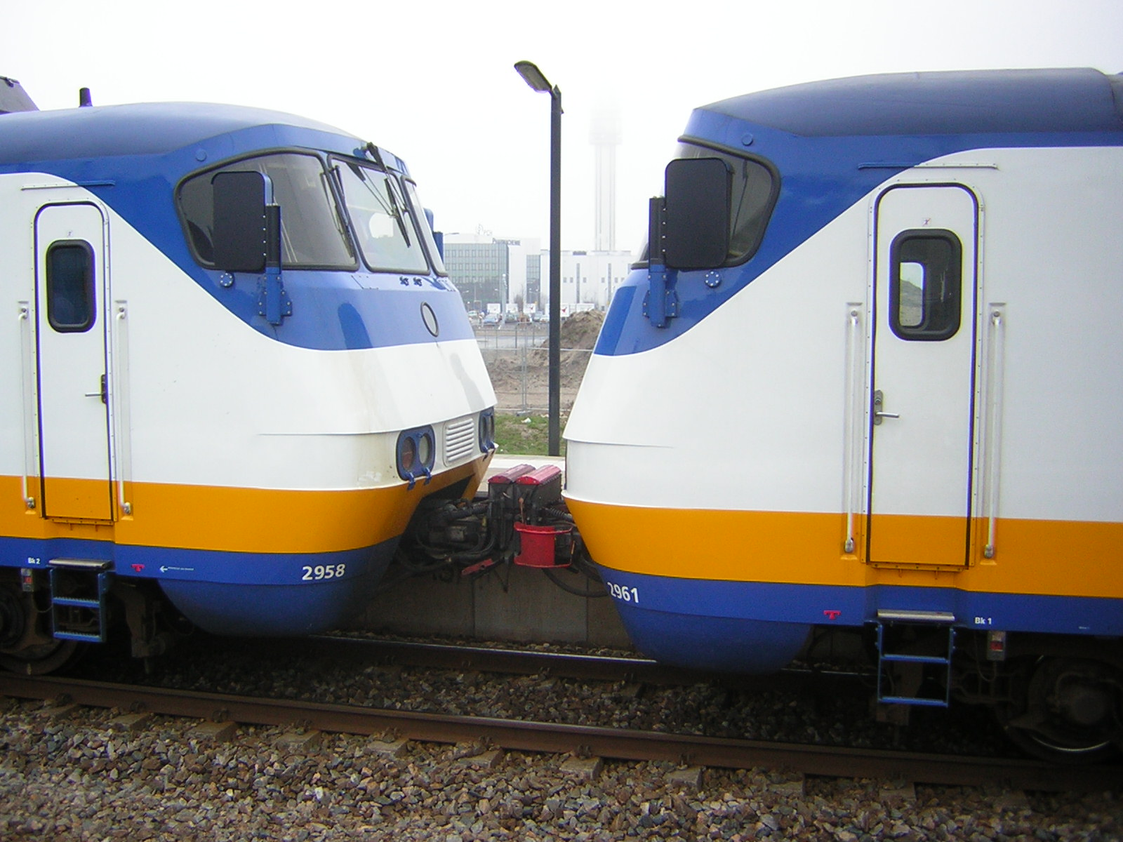 Gekoppelde SGM's te Haarlem Spaarnwoude.